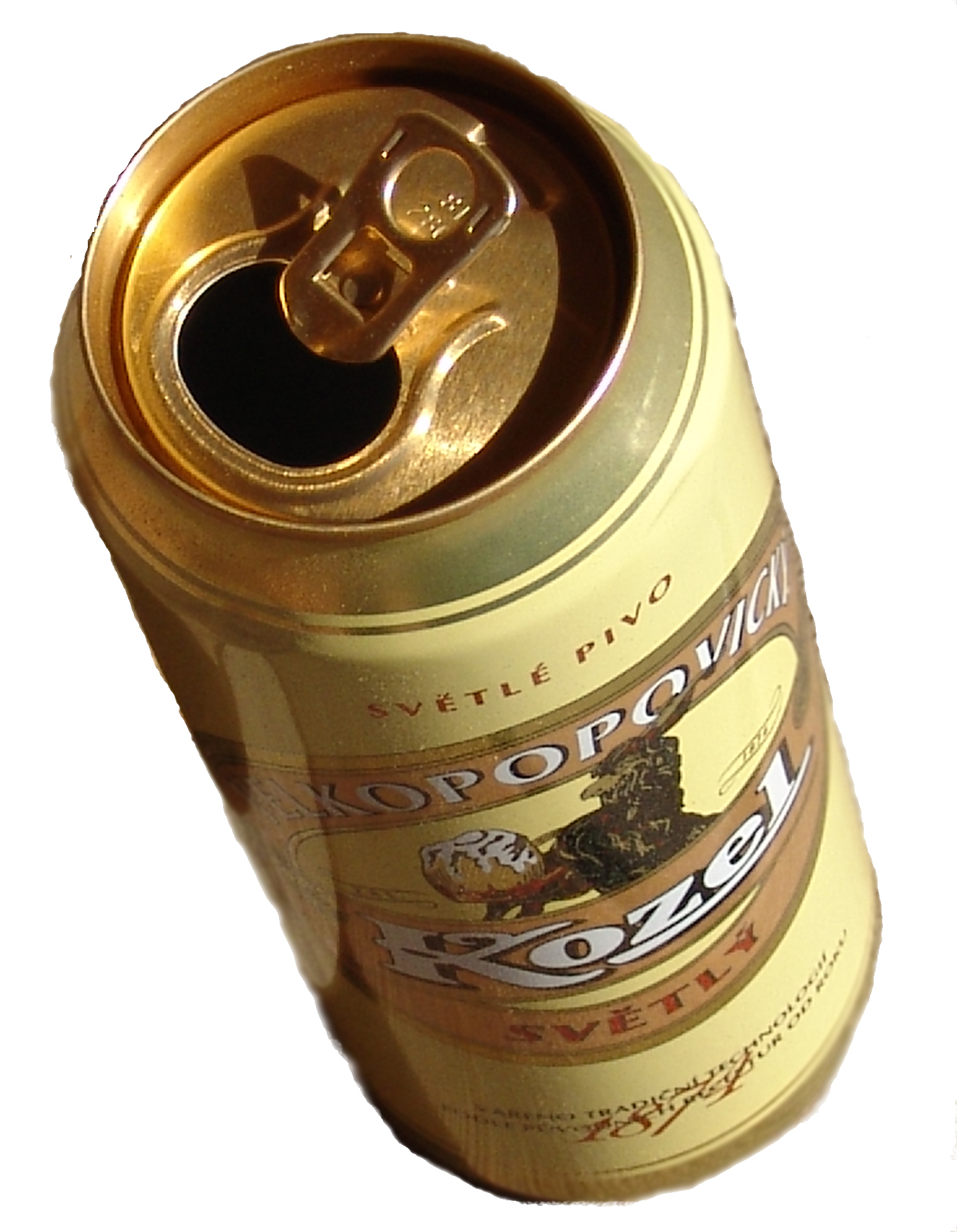 Pivní plechovka Velkopopovického Kozla